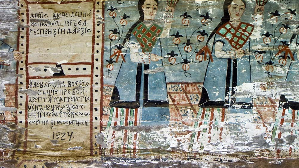 Sârbi, Sălaj: biserica de lemn, pictură în tindă.